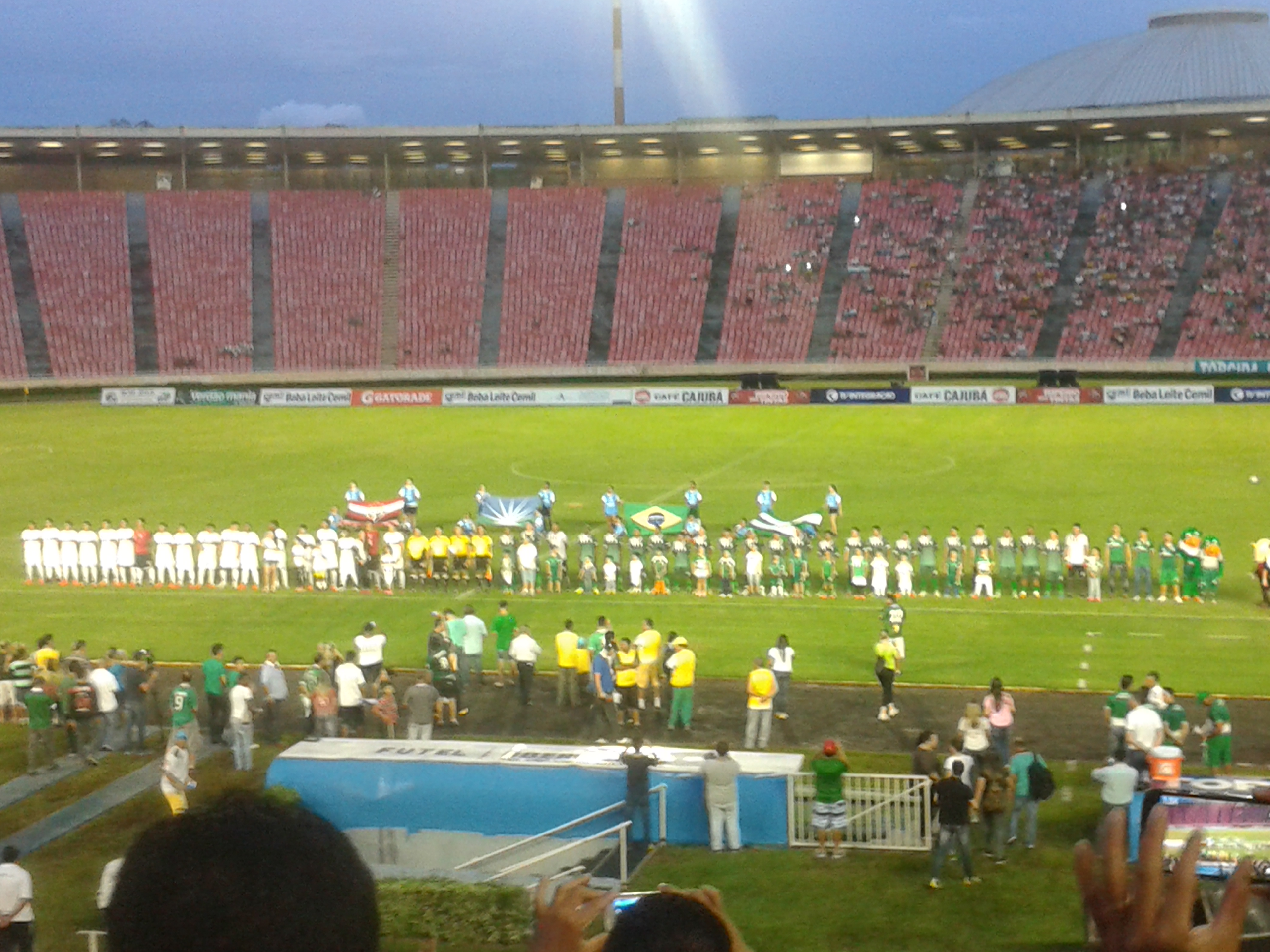 Amistoso comemorativo entre Uberlândia e São Paulo-Sub 23 em disputa da Taça Zecão em homenagem ao falecido ídolo do Uberlândia Esporte Clube.